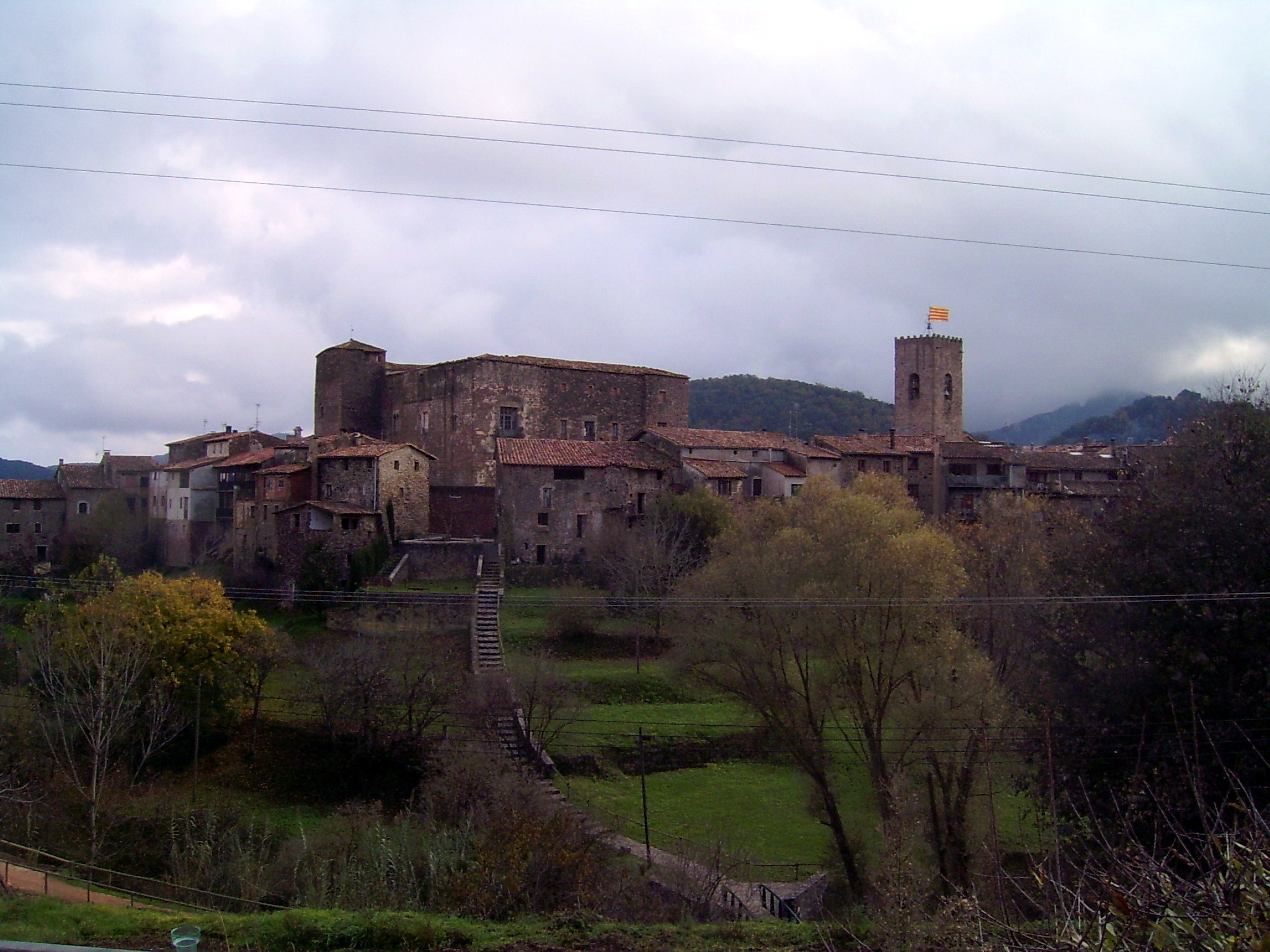 Vista de Santa Pau, amb el Castell.